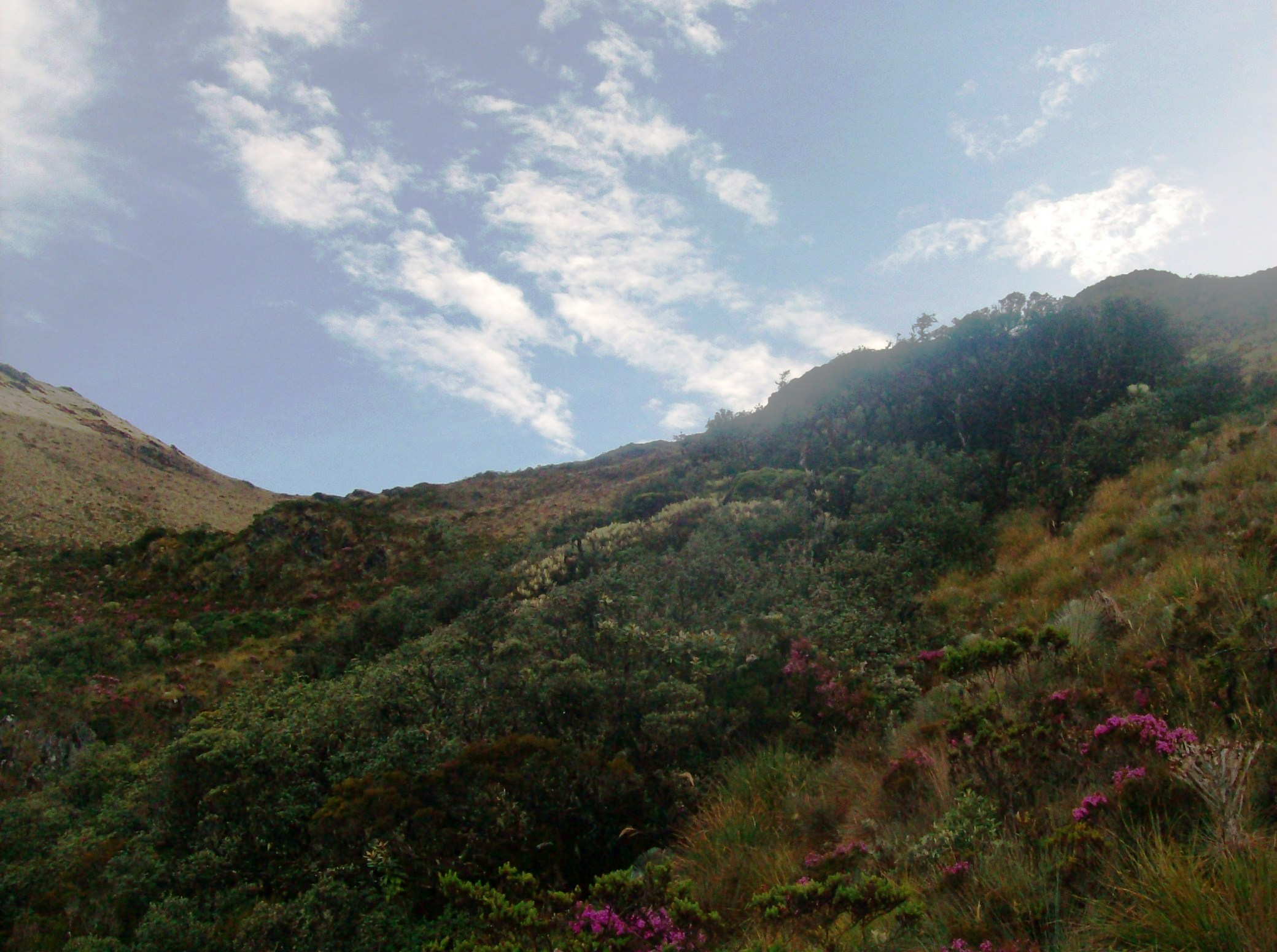 vegetacion